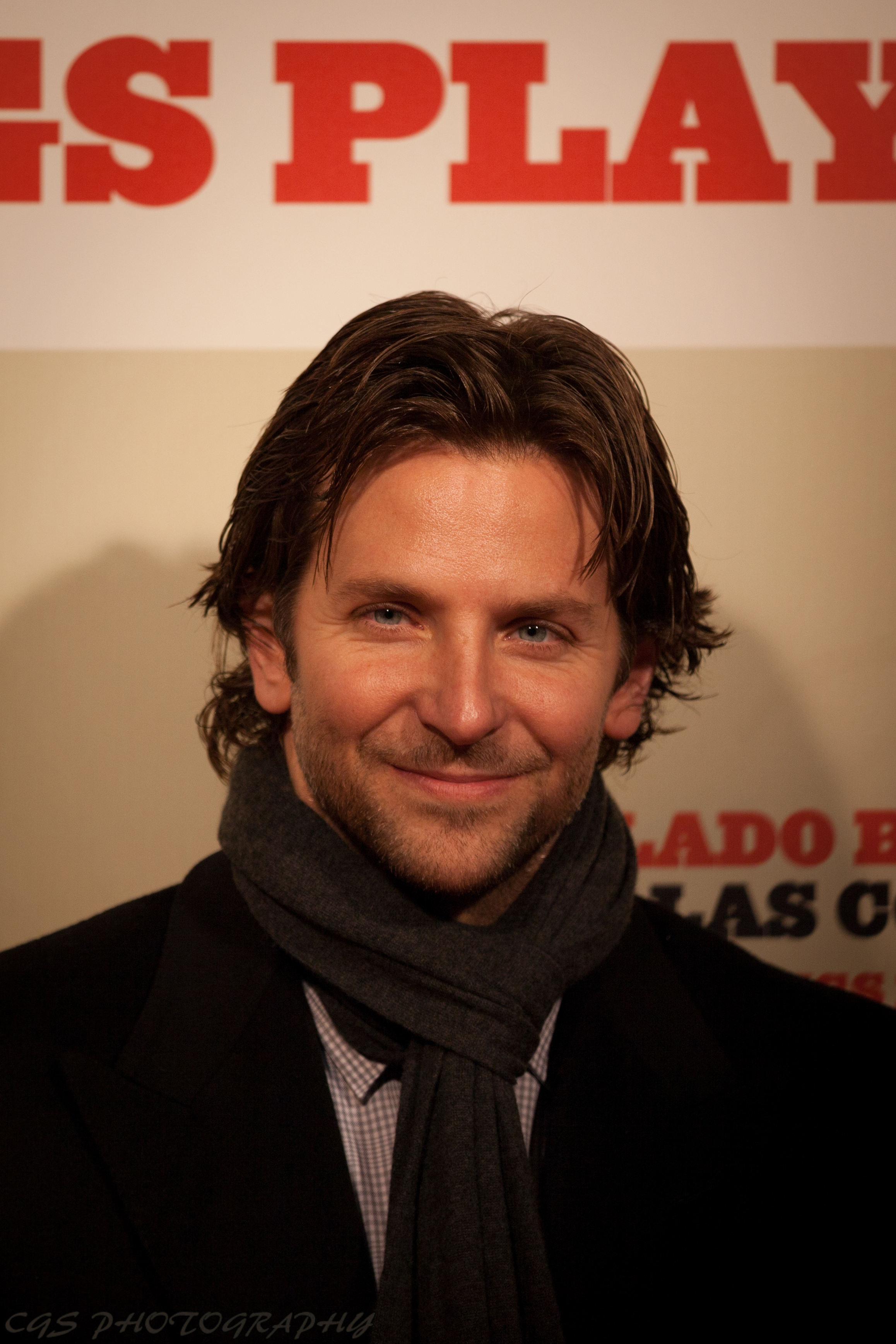 En la premiere de El lado bueno de las cosas, Silver Linings Playbook, en los cines Callao. Gracias a Pandora Magazine